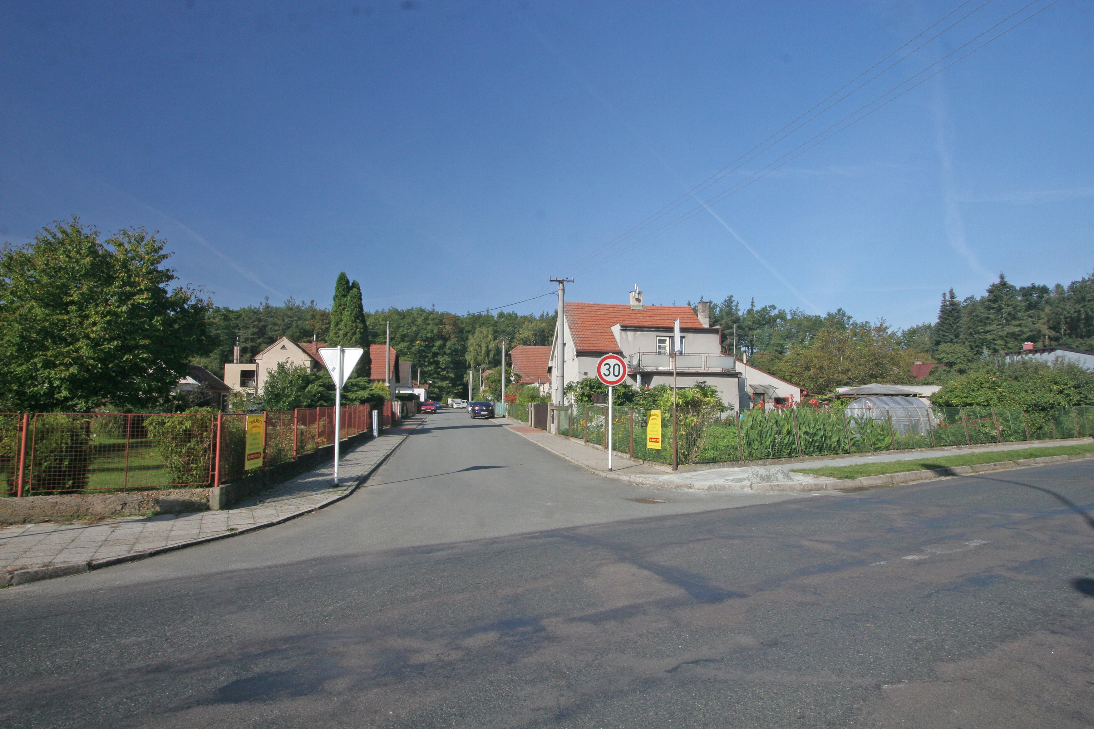 Veselí čp. 81